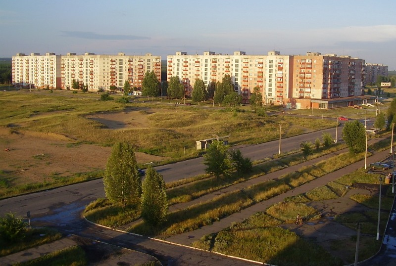 Rubizhne panorama